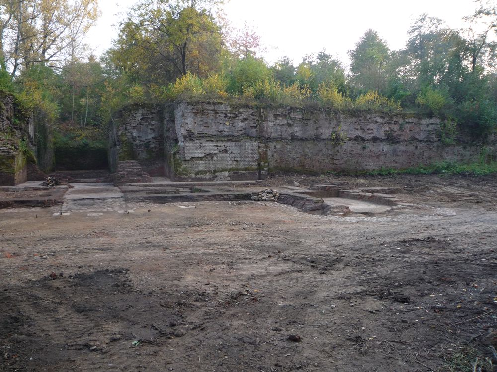 widok na prawe skrzydło budynku